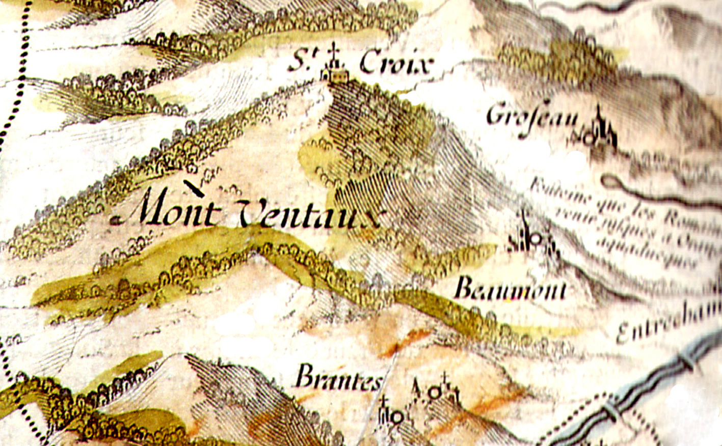 Carte du secteur du Mont Ventoux et Sainte Croix